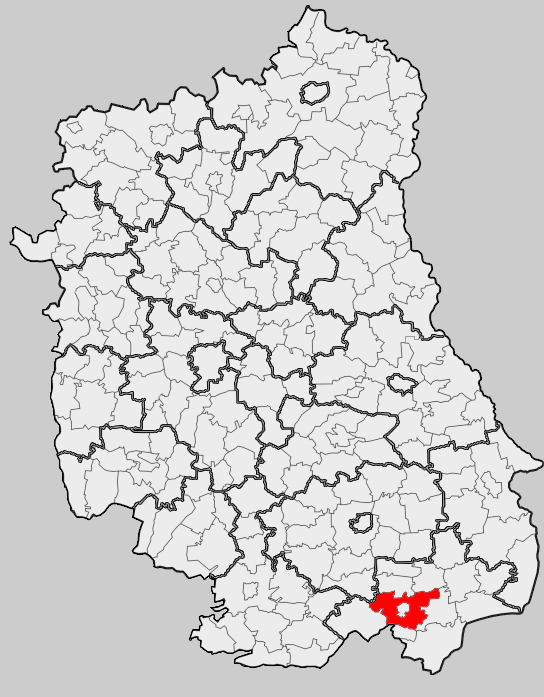 Map of gmina Tomaszów Lubelski (rural), Tomaszów Lubelski county, Lublin voivodship Mapa gminy Tomaszów Lubelski (wiejska), powiat tomaszowski, województwo lubelskie